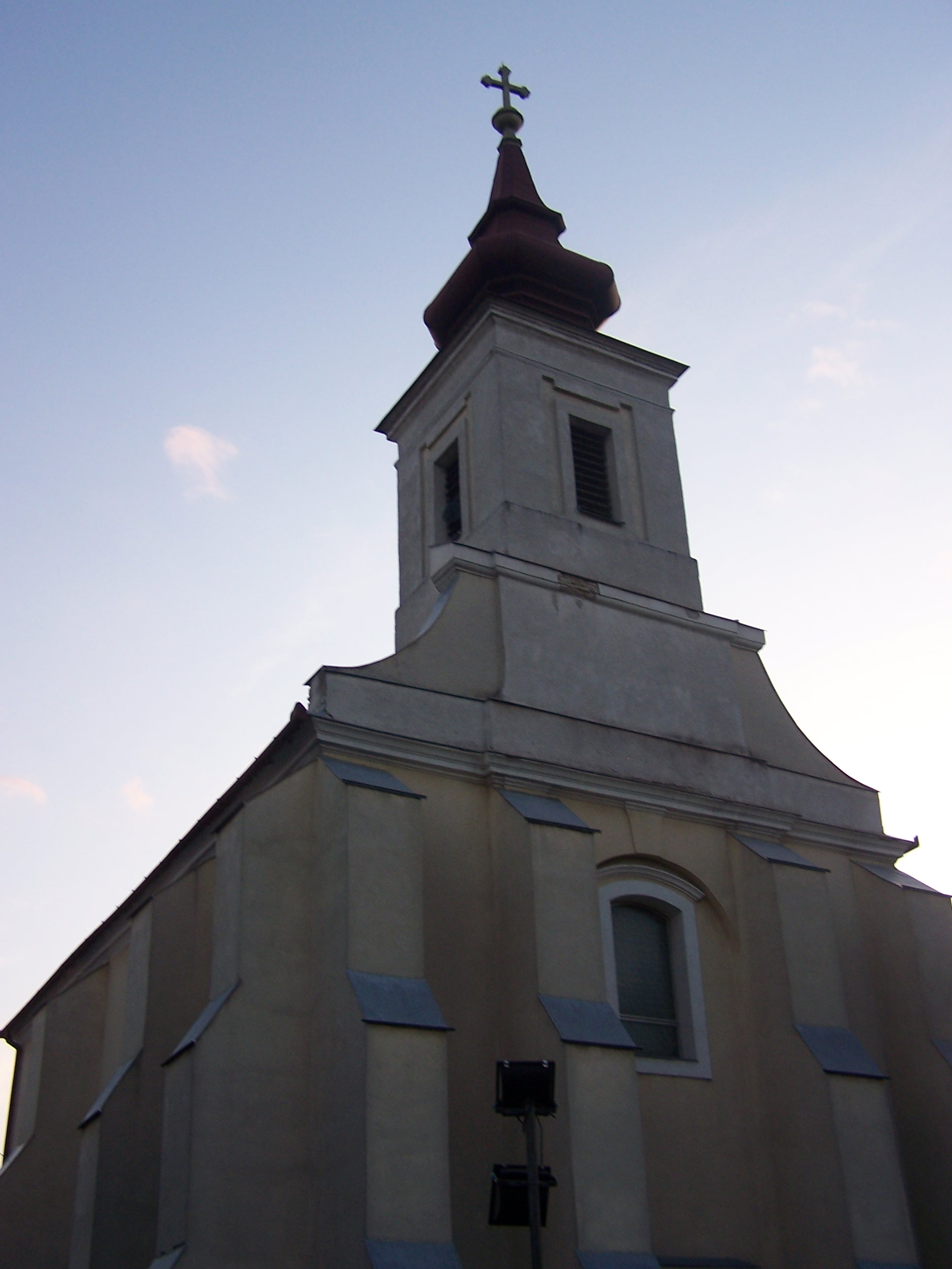 Keresztelő Szent János római katolikus templom (Szada, Dózsa Gy. u. 110.) This is a photo of a monument in Hungary, Identifier: 7319